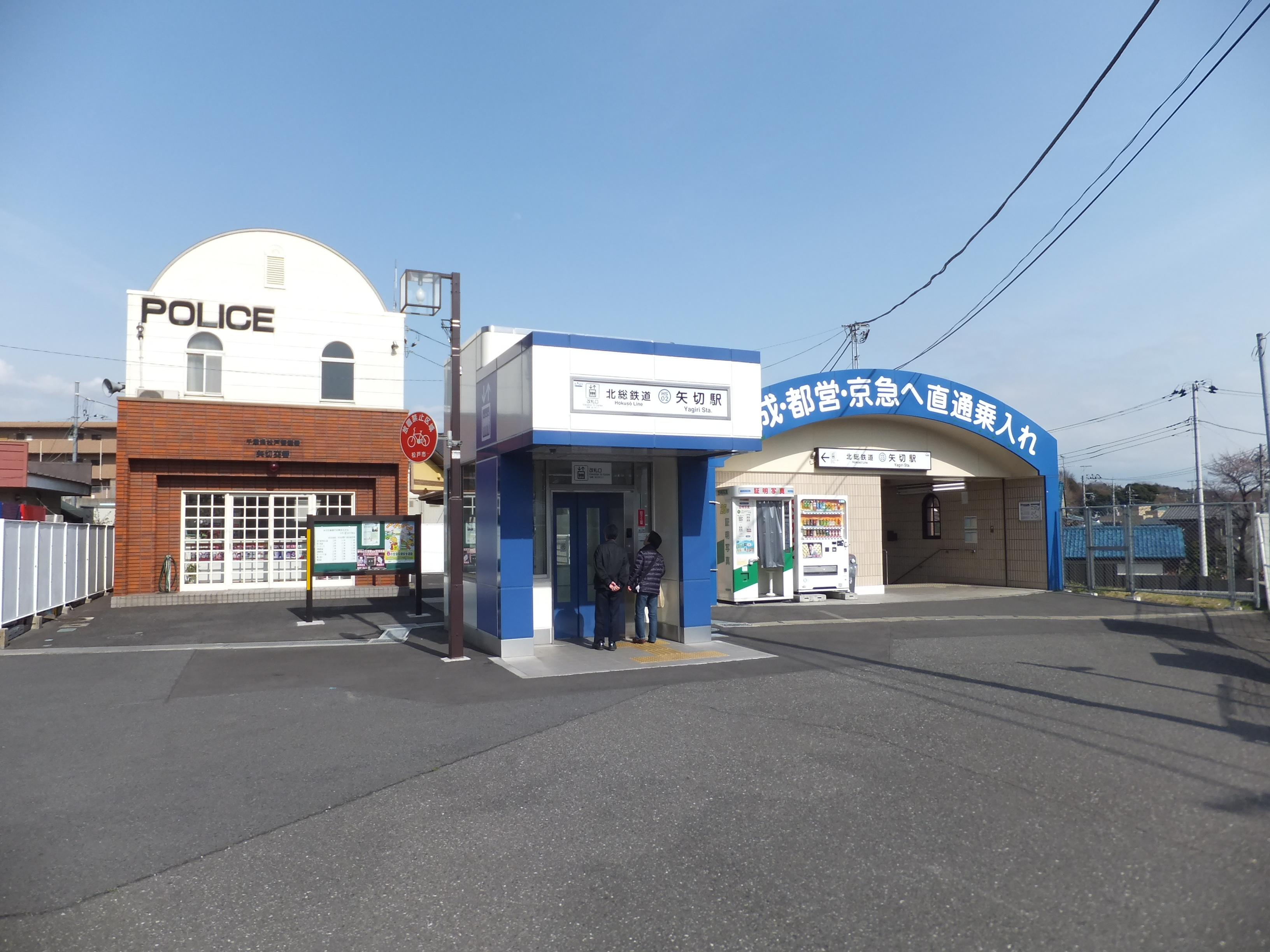 北総鉄道矢切駅入口